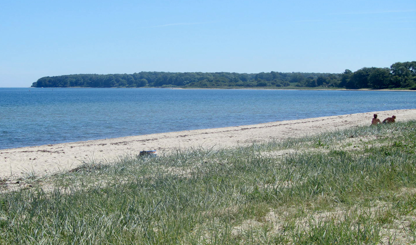 As Hoved set fra As Vig